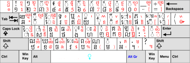 Windowsのクメール語キーボード